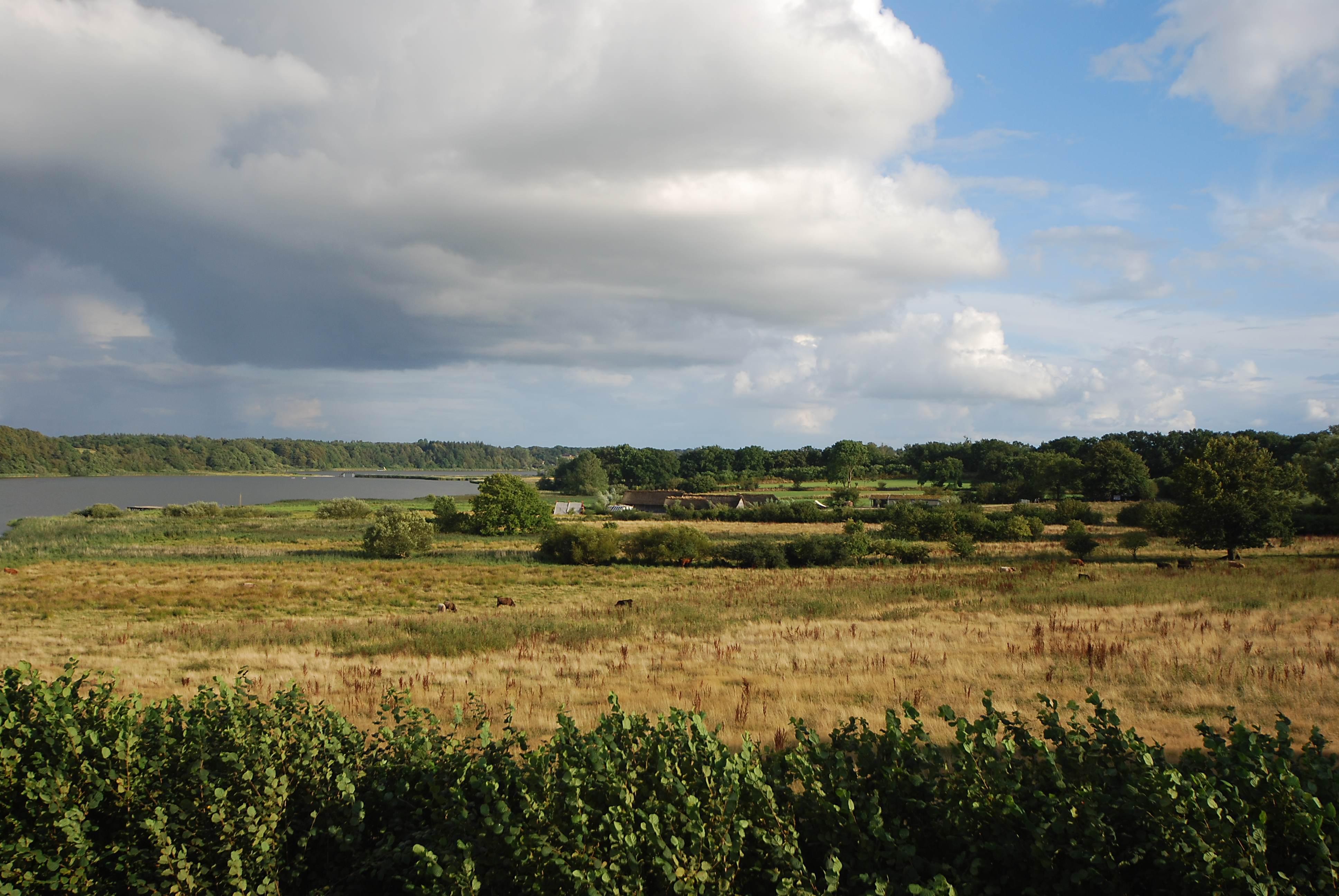 Archäologisches Bodendenkmal Haithabu in der Gemeinde Busdorf im Kreis Schleswig-Flensburg in Schleswig-Holstein